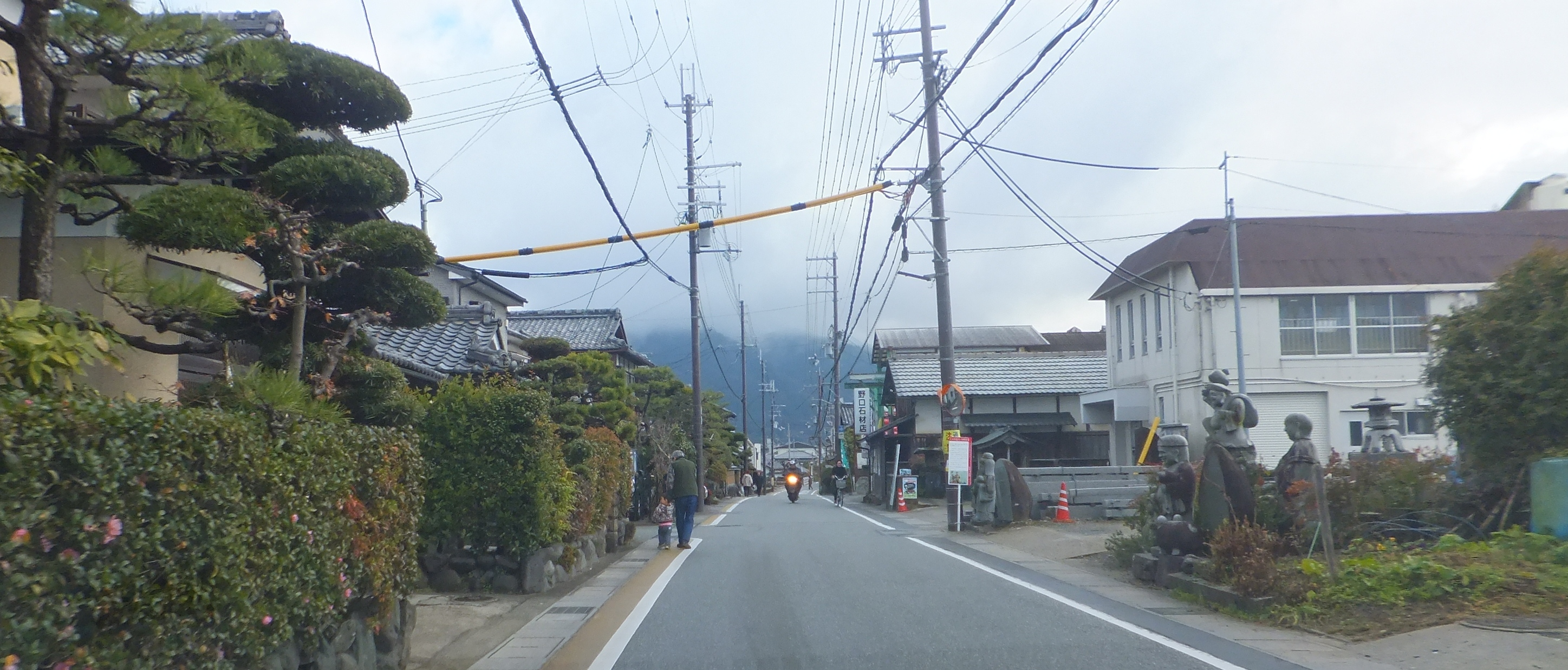 京都府亀岡市三宅町 京都府道402号王子並河線